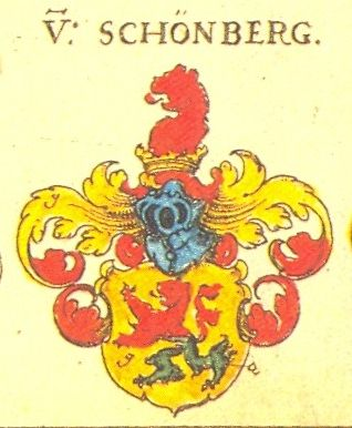 Coat of Arms, Schönberg Family, Meissen Saxony (from: Johann Siebmacher: New Wappenbuch, scan from: Horst Appuhn, Johann Siebmachers Wappenbuch. Die bibliophilen Taschenbücher 538, 2. verb. Aufl , Dortmund 1989 Meißner, Blatt 152)